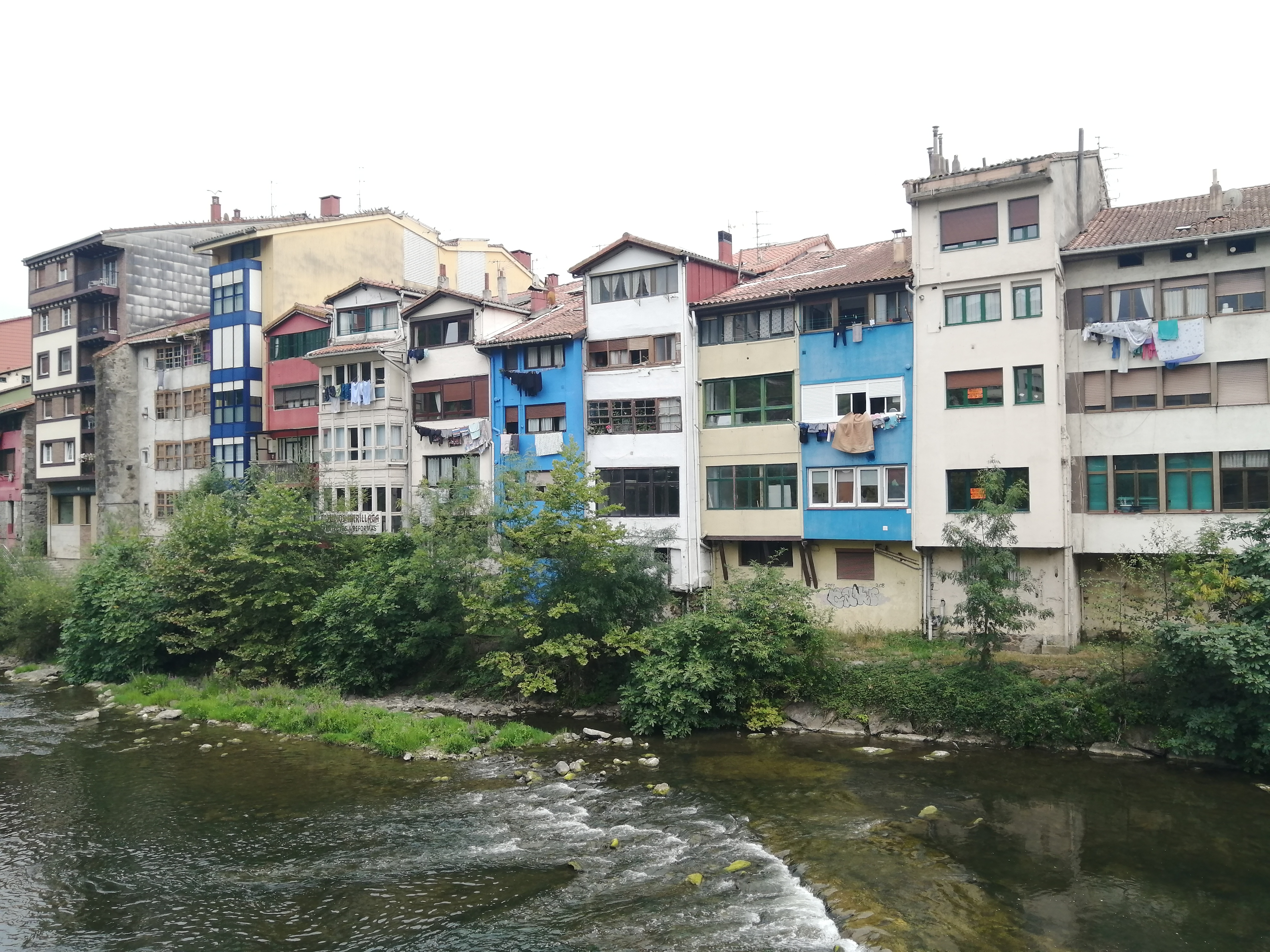 Elgoibar. Deba ibaia eta alde zaharreko etxeak